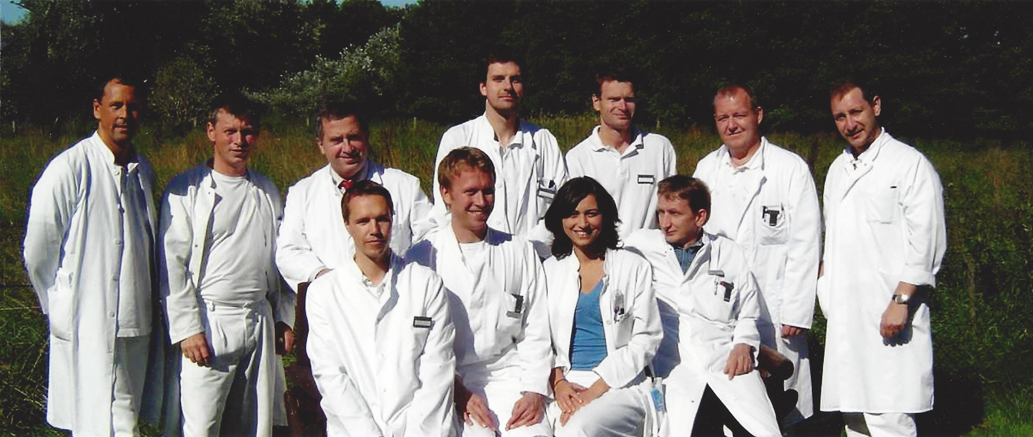 Ärzte der Abteilung für Orthopädische, Unfall- und Handchirurgie, Krankenhaus Plau am See.